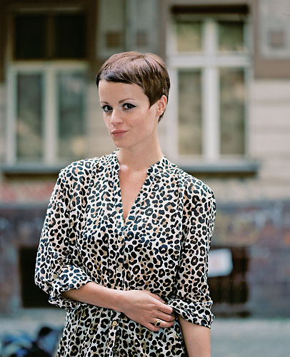 Porträt von Rabea Edel.